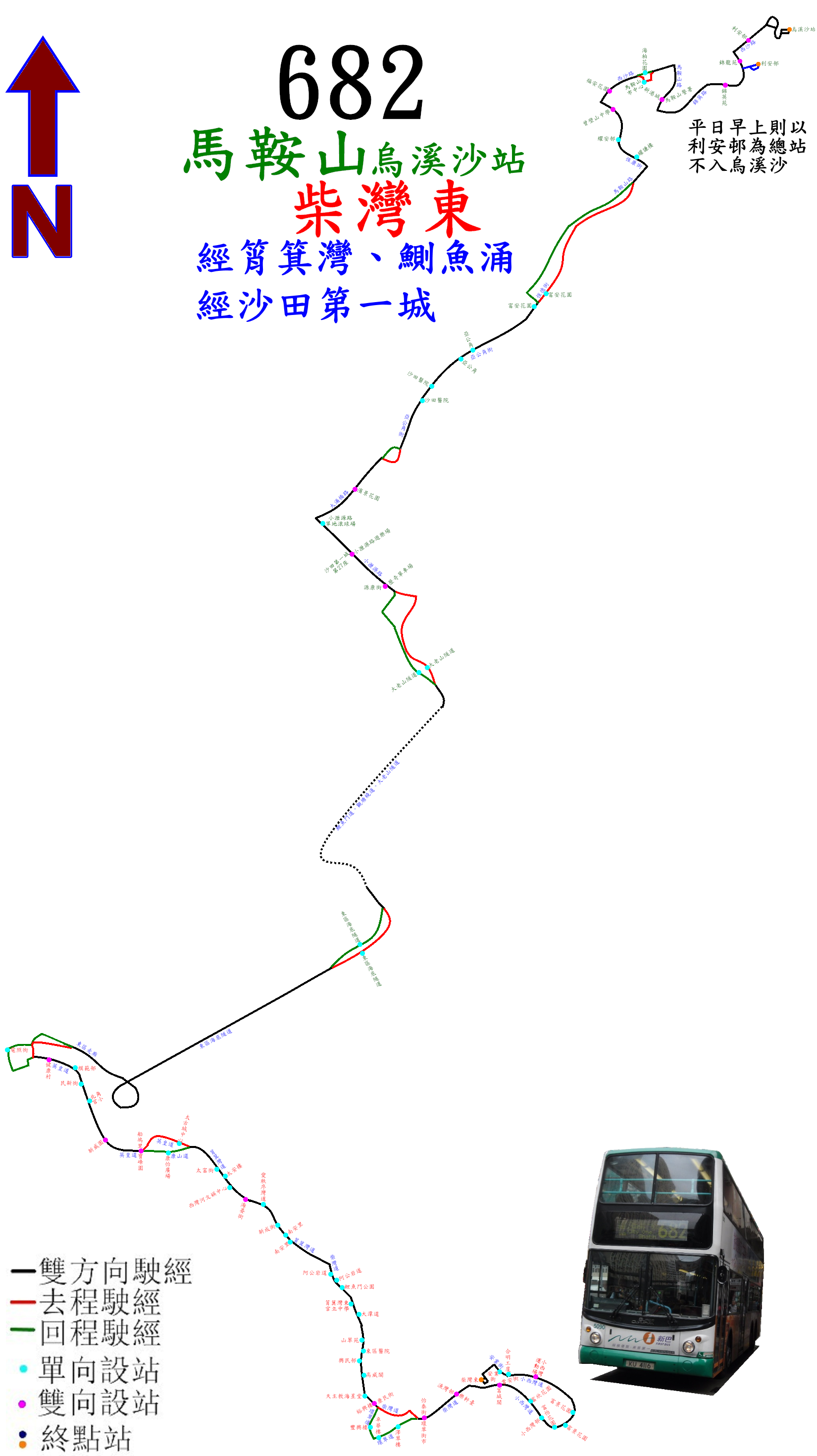 中文（香港）: 過海隧巴682線的走線圖